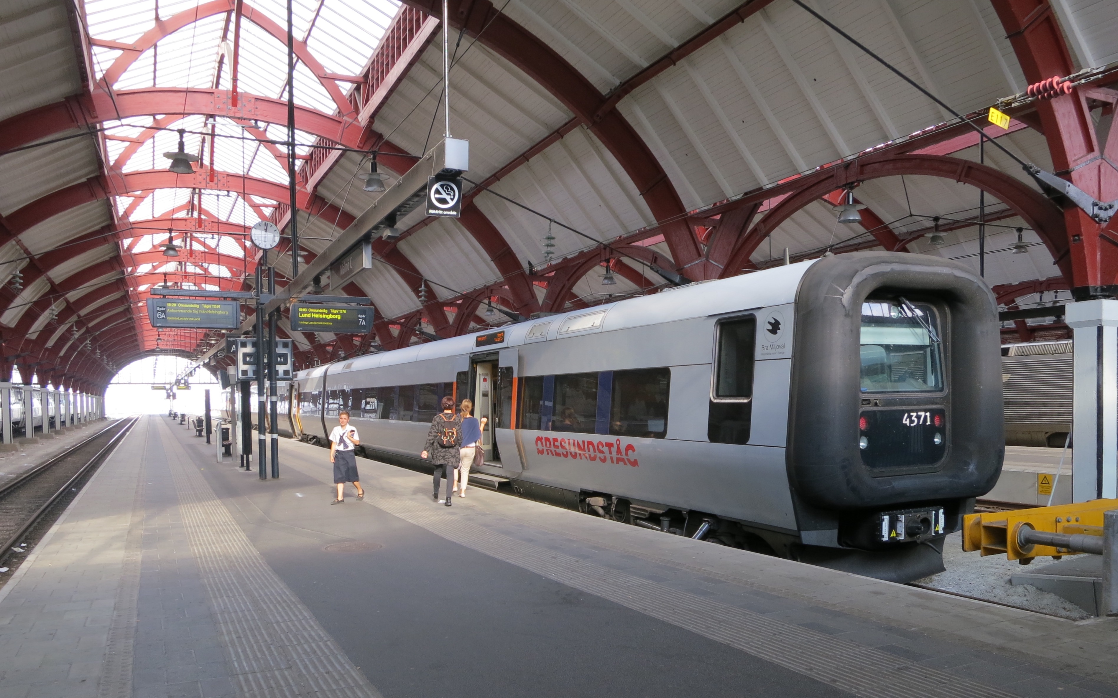 Malmö C, spår 7